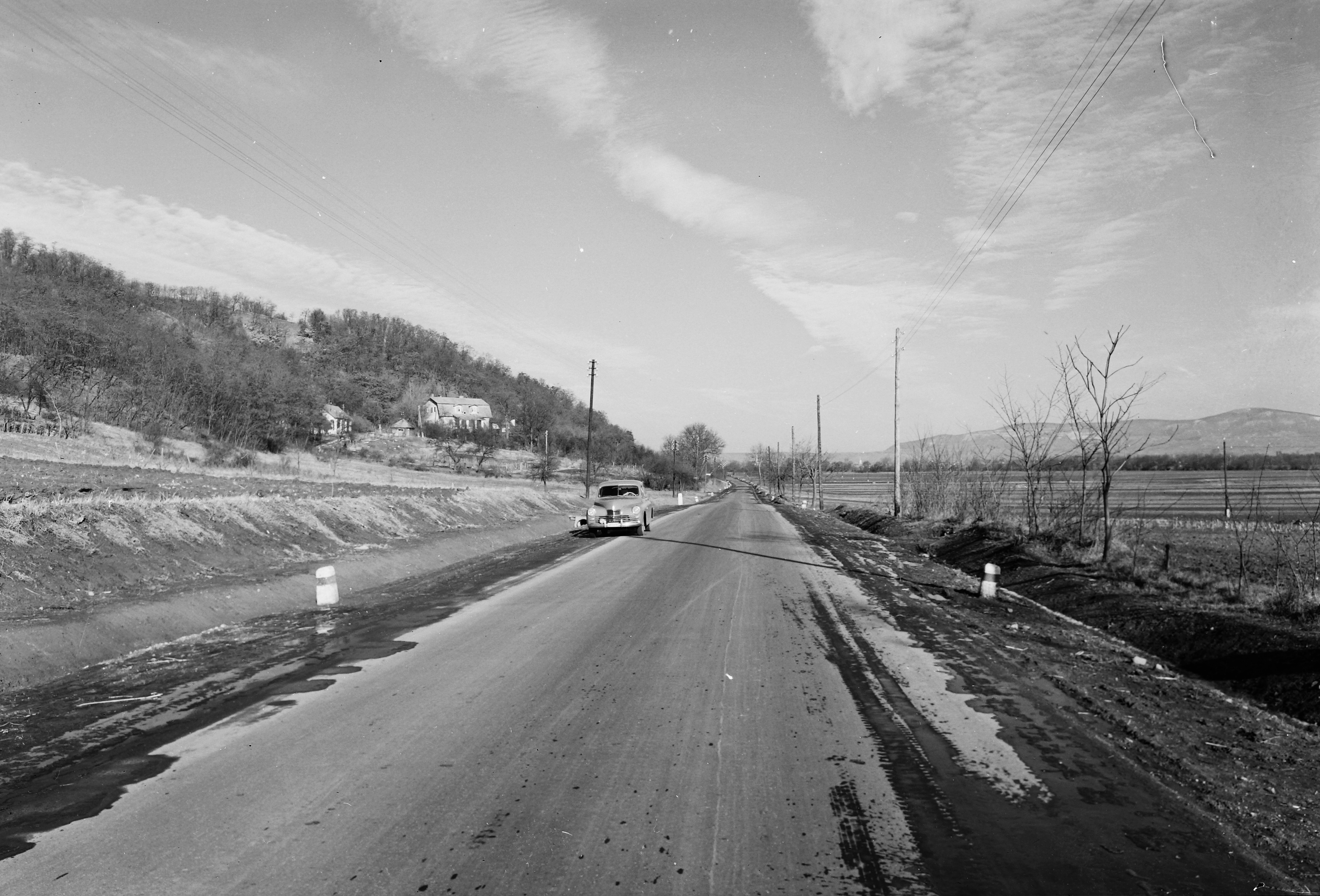 GAZ-M20 Pobeda autó az egyik út mentén amelyet az UVATERV tervezett / épített?, M.-on? Tags: M20 Pobieda